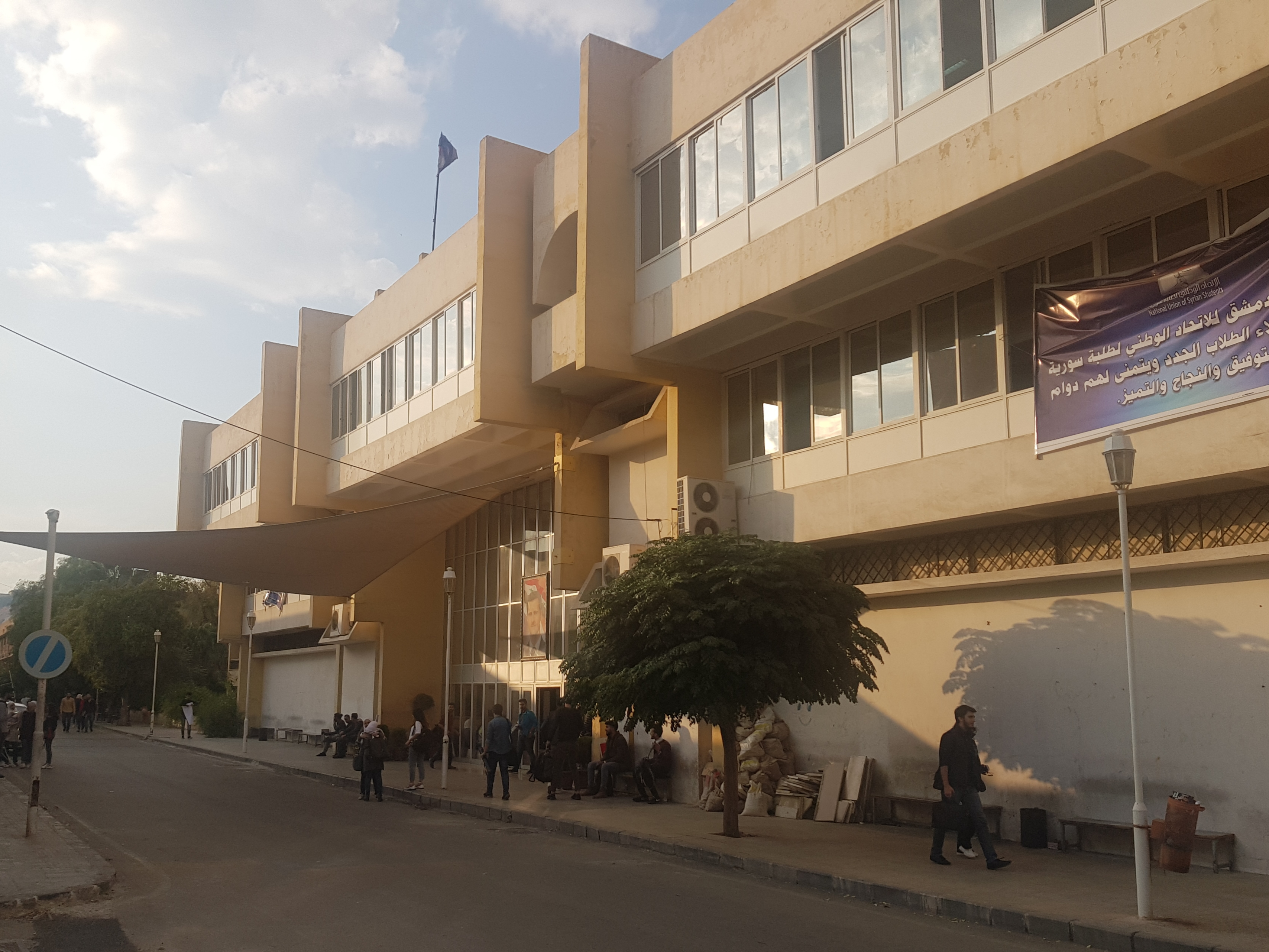 الواجهة الرئيسية لمبنى كلية الهندسة المعمارية